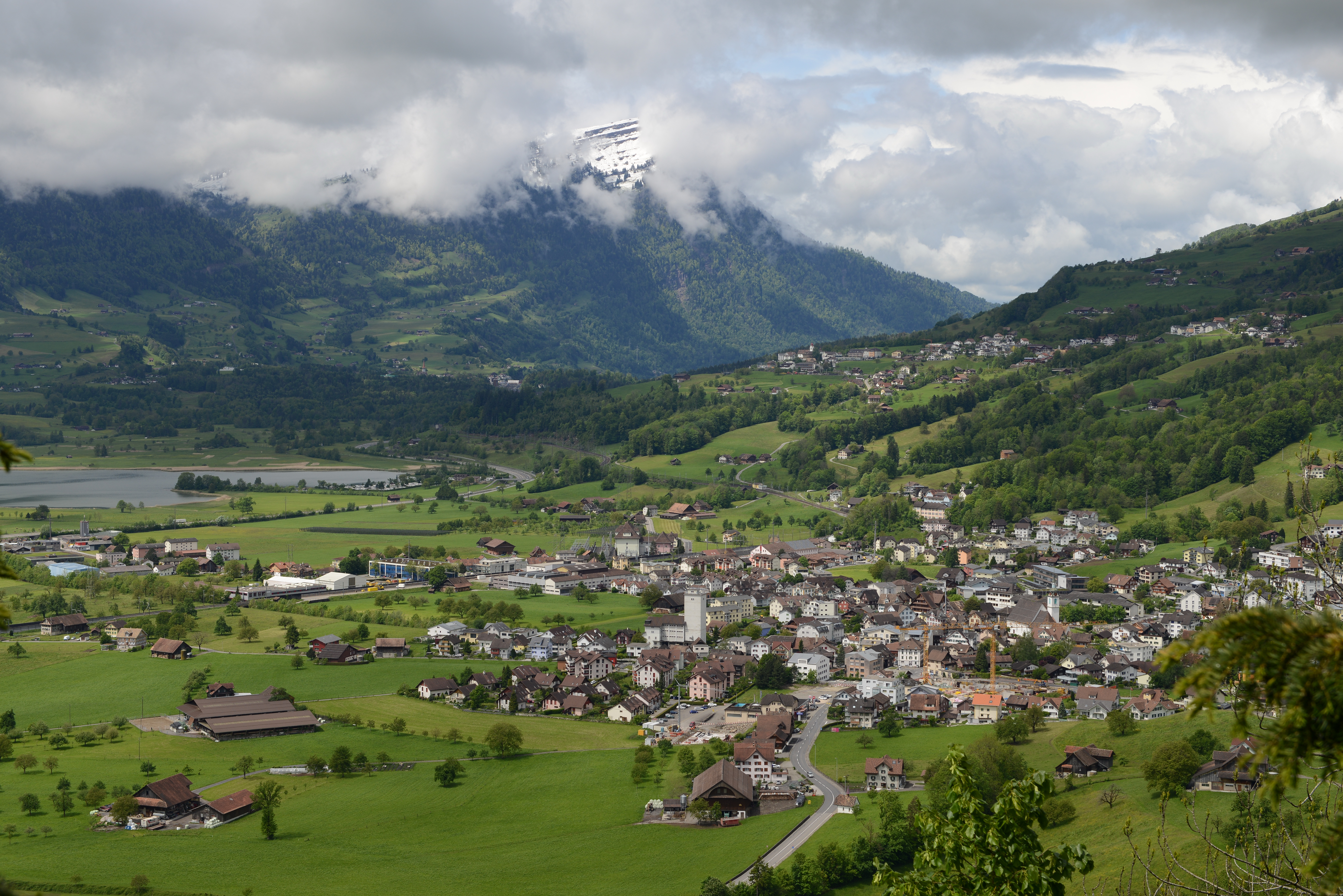 Steinen SZ am Lauerzersee.